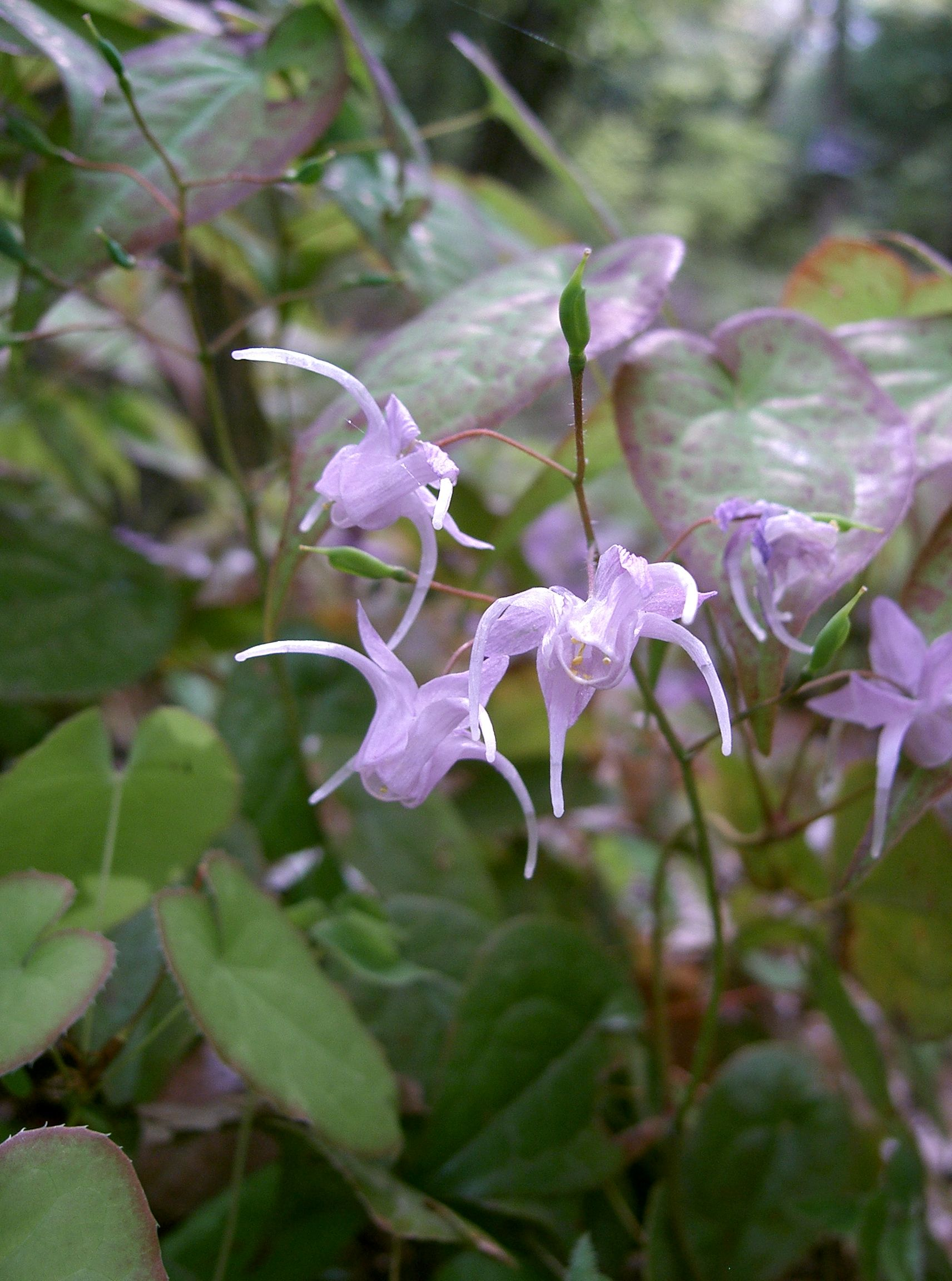 Epimedium grandiflorum var. thunbergianum